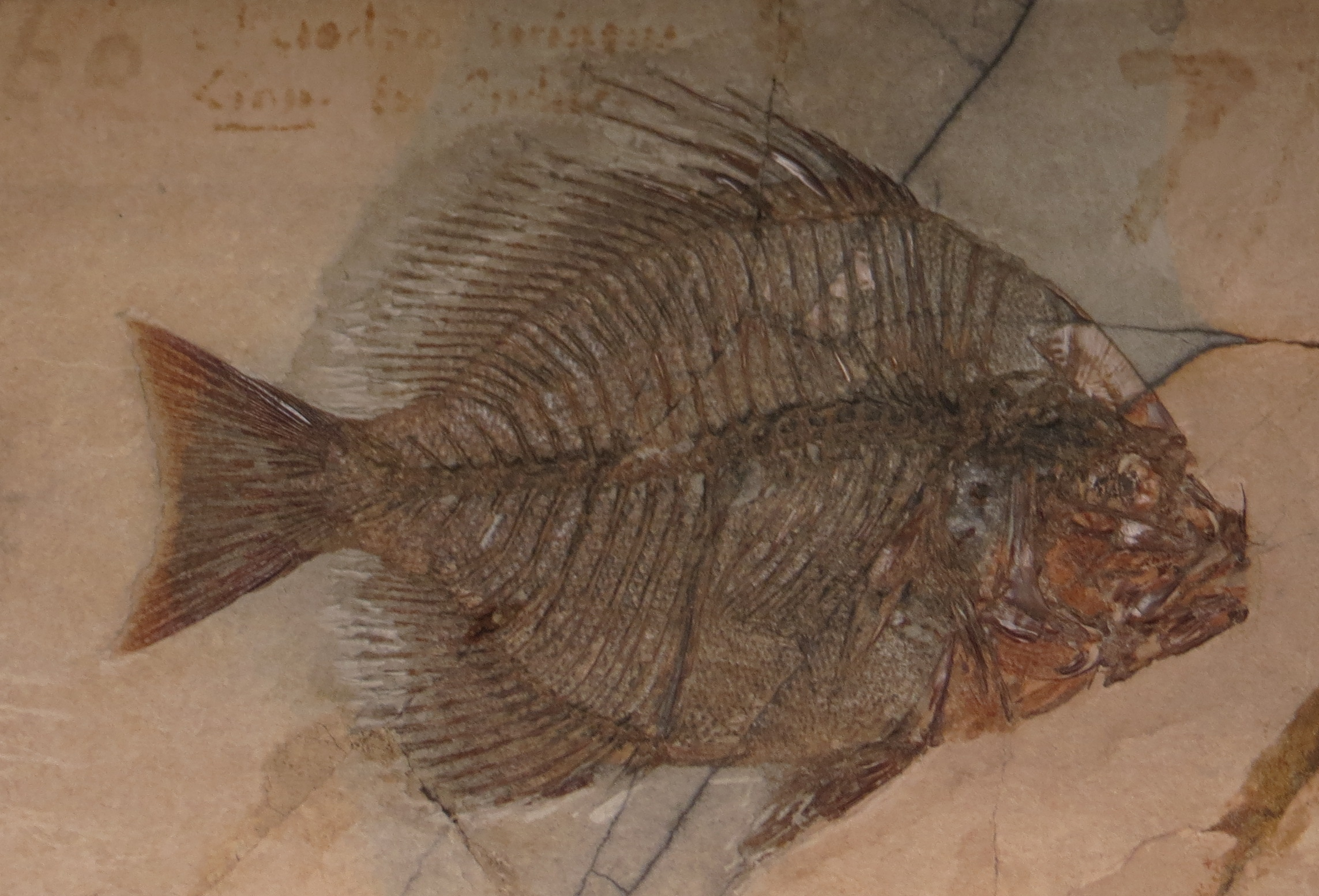 Archaephippus asper fossil